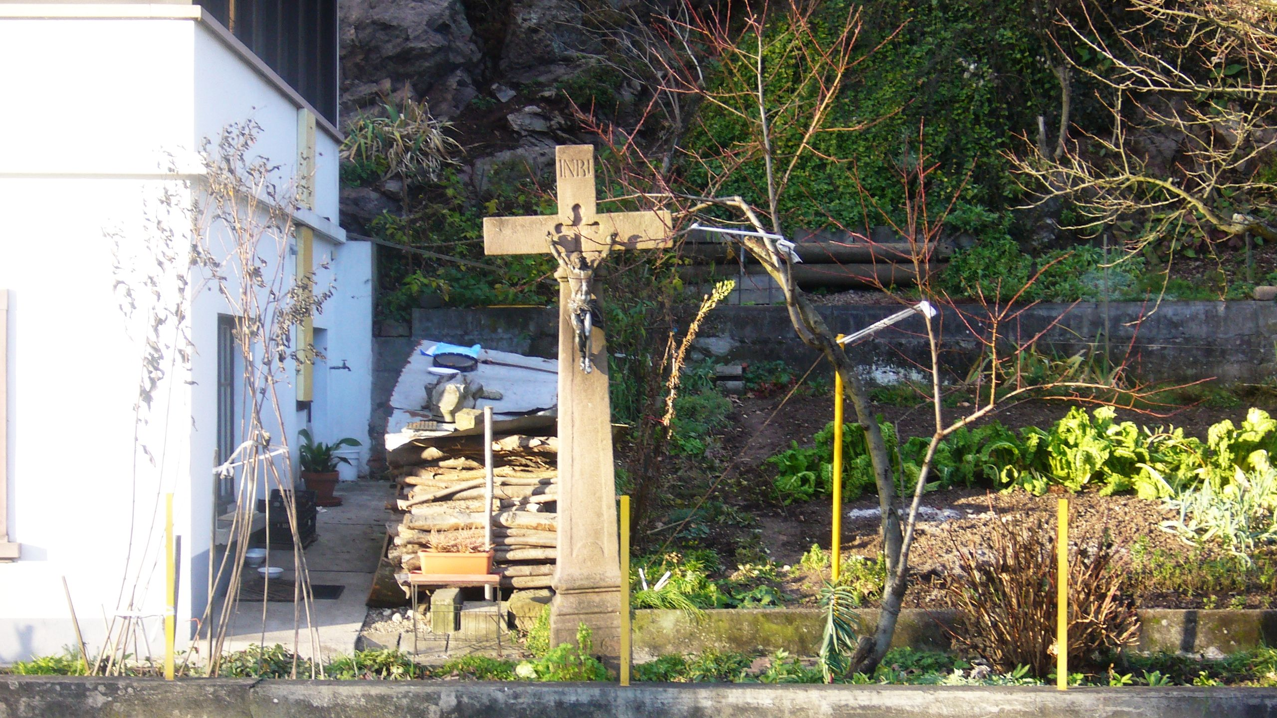 Lièpvre A 017.JPG